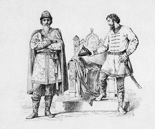 Великие Князья, Святослав Всеволодович и Андрей Ярославич. 1247-1252 г.Великокняжеский престол Ярослава занял Святослав Всеволодович, по настоянию хана уступивший княжение Андрею Ярославичу. Последний оставил престол не желая быть данником Батыя.